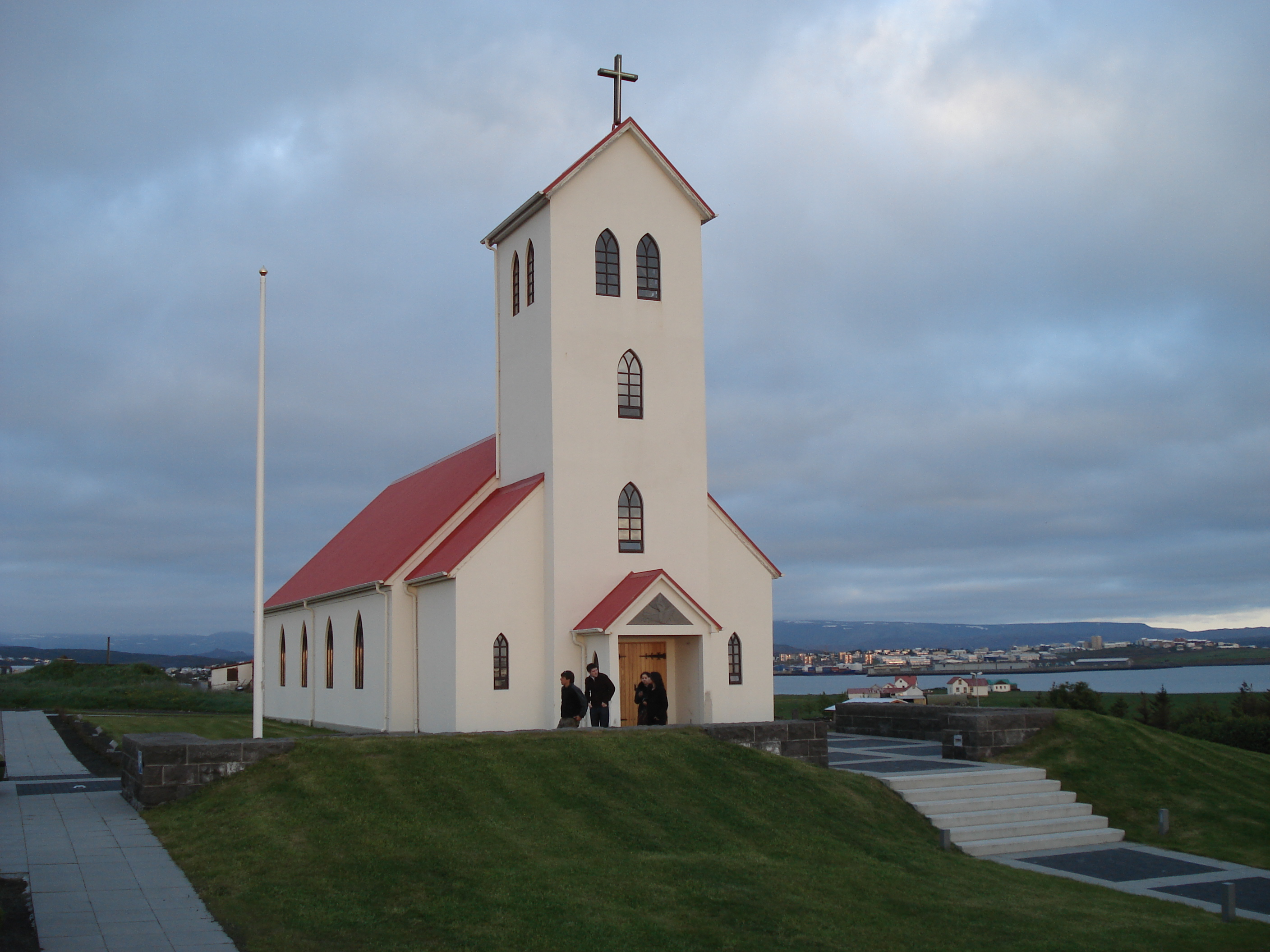 Garðakirkja in Garðabær Iceland